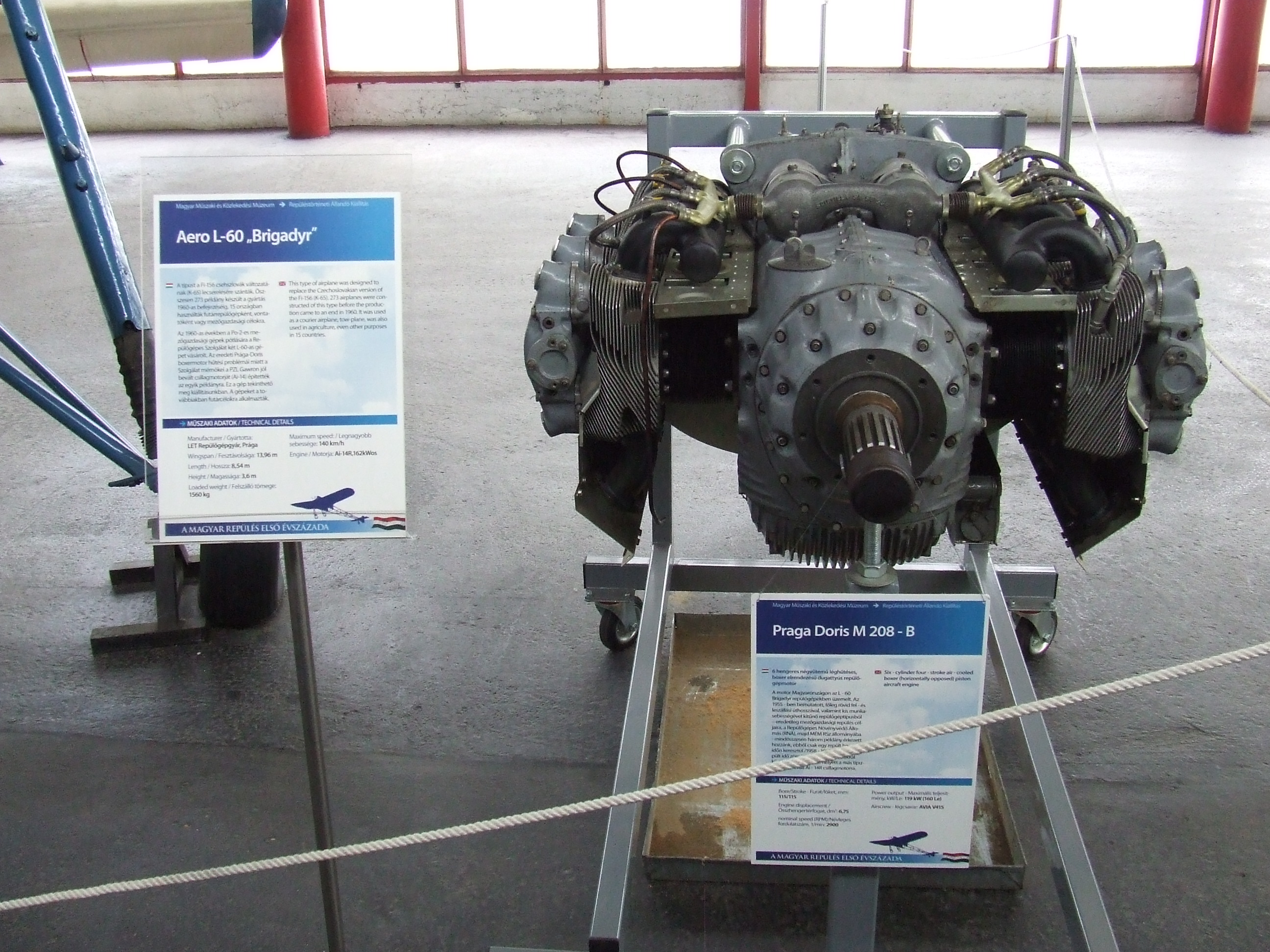 Petőfi Csarnok, Repüléstörténeti kiállítás, Praga Doris M 208-B